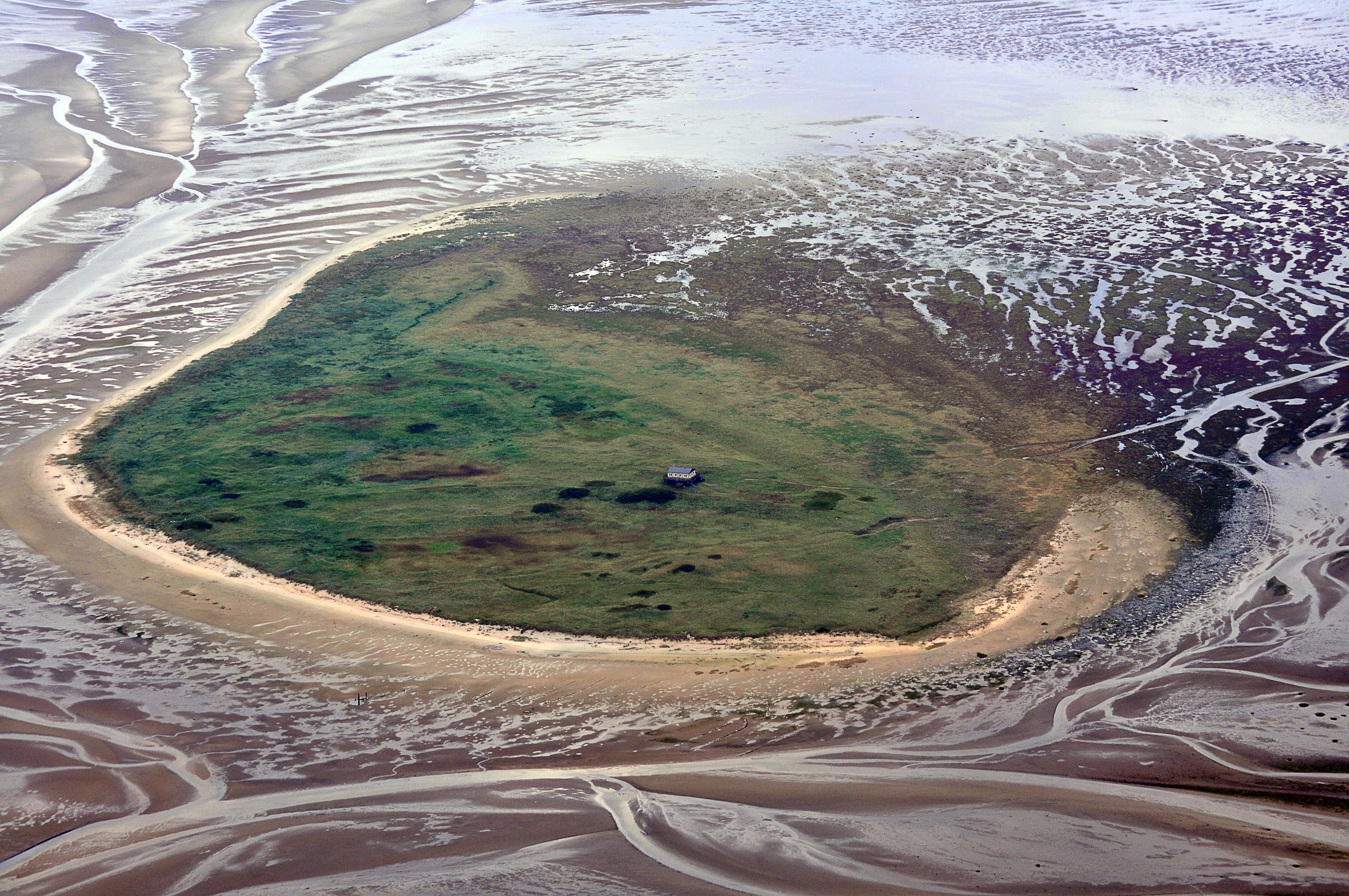 Fotoflug Nordsee, Scharhörn